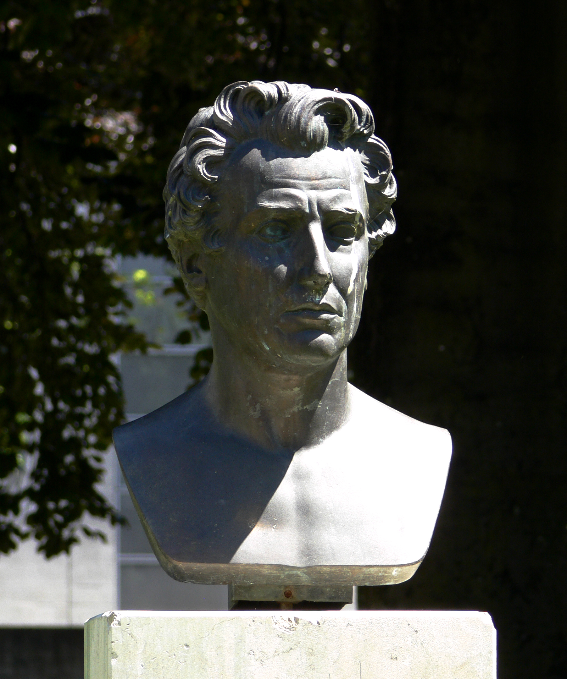 Schaffhausen, Mosergarten, Denkmal für Heinrich Moser